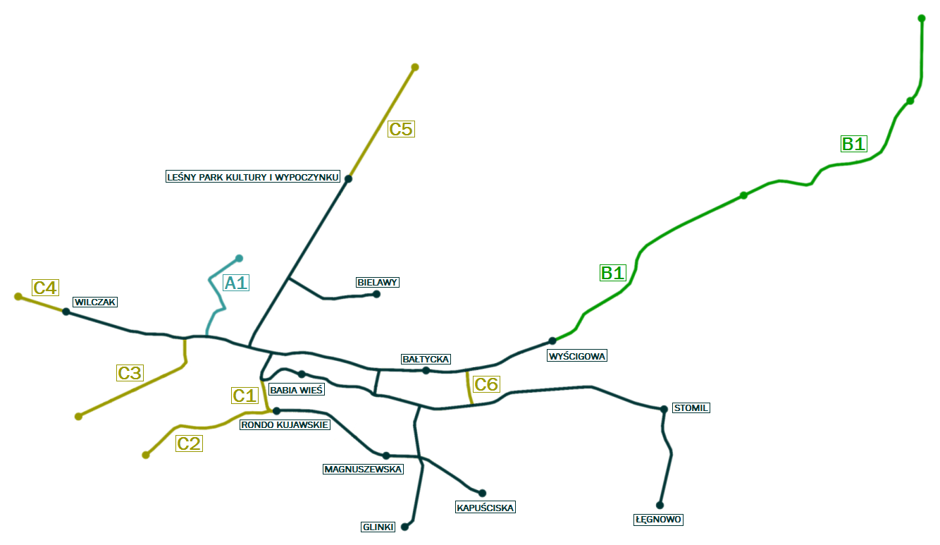 Plany rozbudowy sieci tramwajowej w Bydgoszczy do roku 2030.